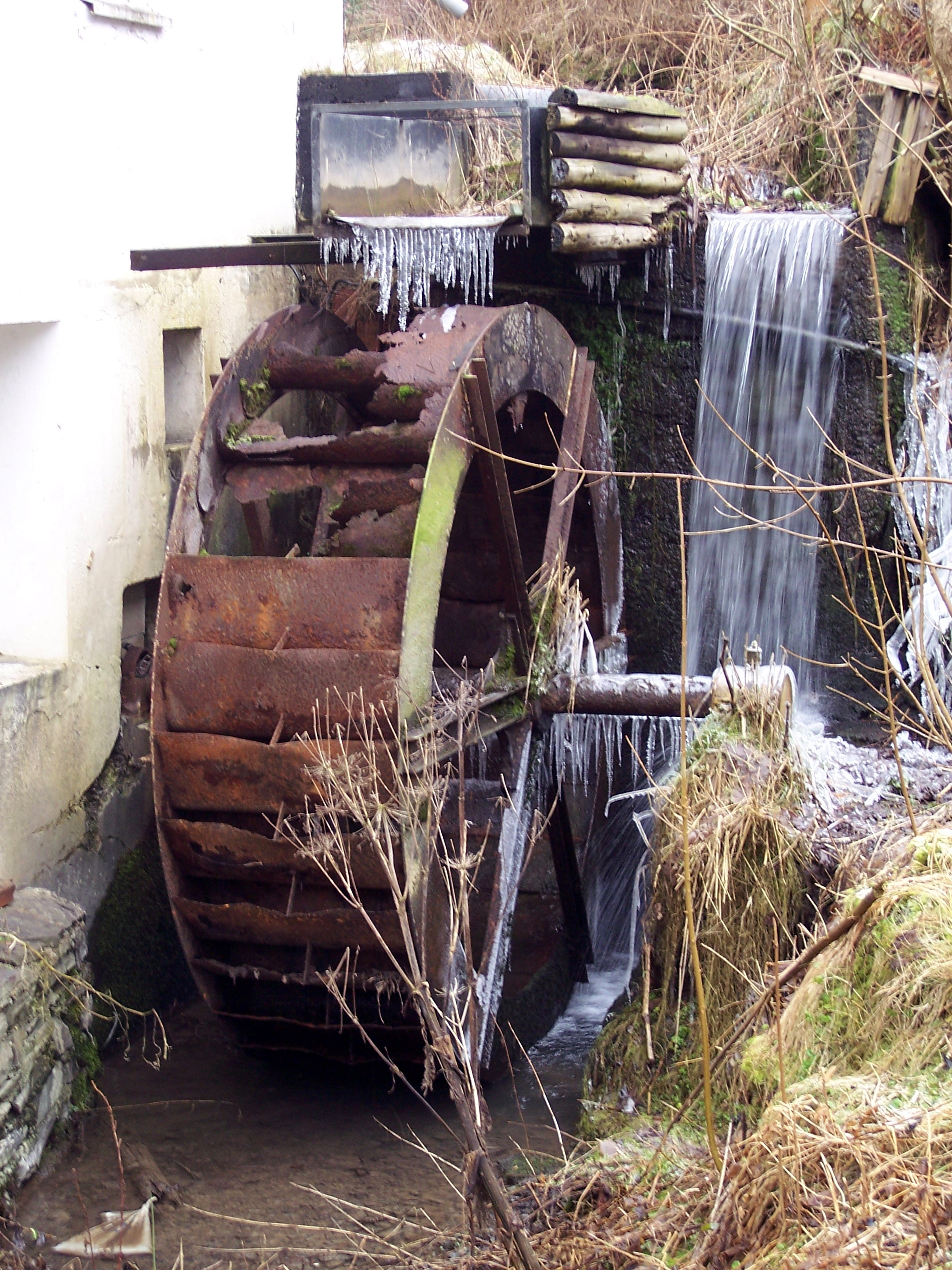 Wasserrad der Oedenthaler Mühle bei Lüdenscheid im Winter